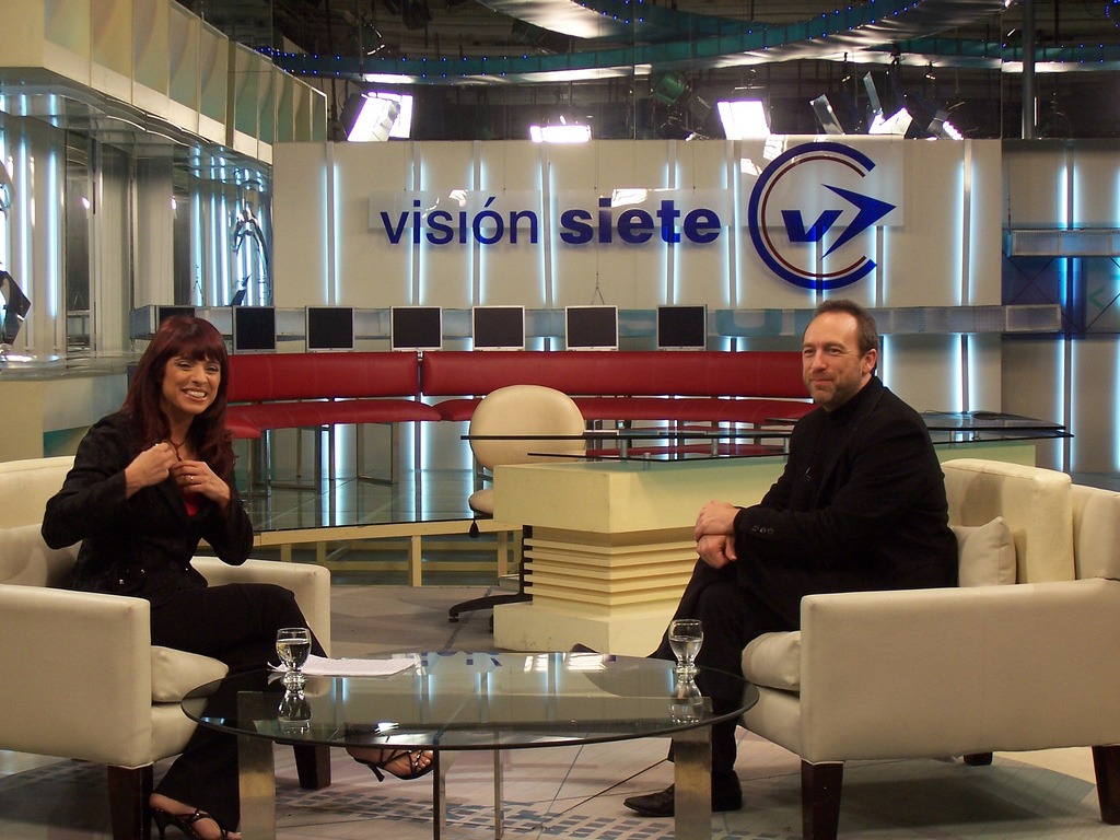 Rosario Lufrano entrevistando a Jimbo Wales, creador de la Wikipedia. En el estudio de Canal 7 Argentina. (Buenos Aires)